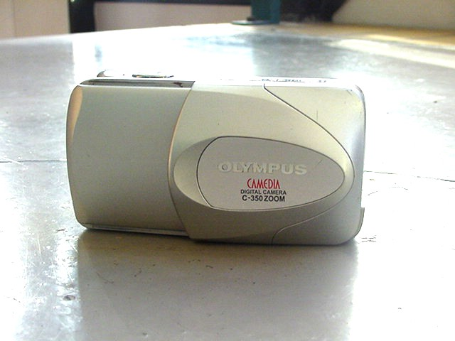 Appareil photographique numérique Olympus Camedia C-350 Zoom